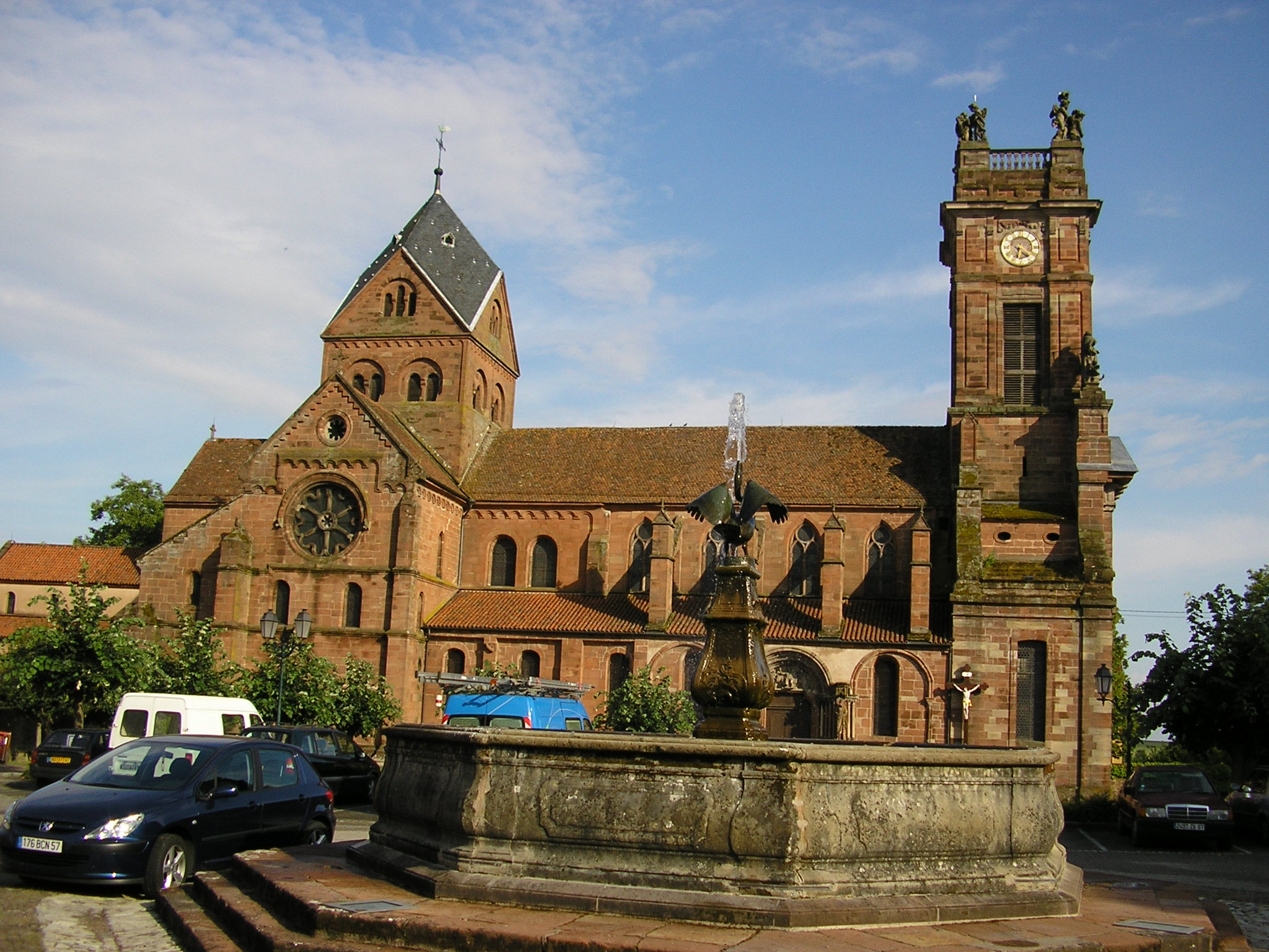 abbatiale st pierre st paul neuwiller (67)